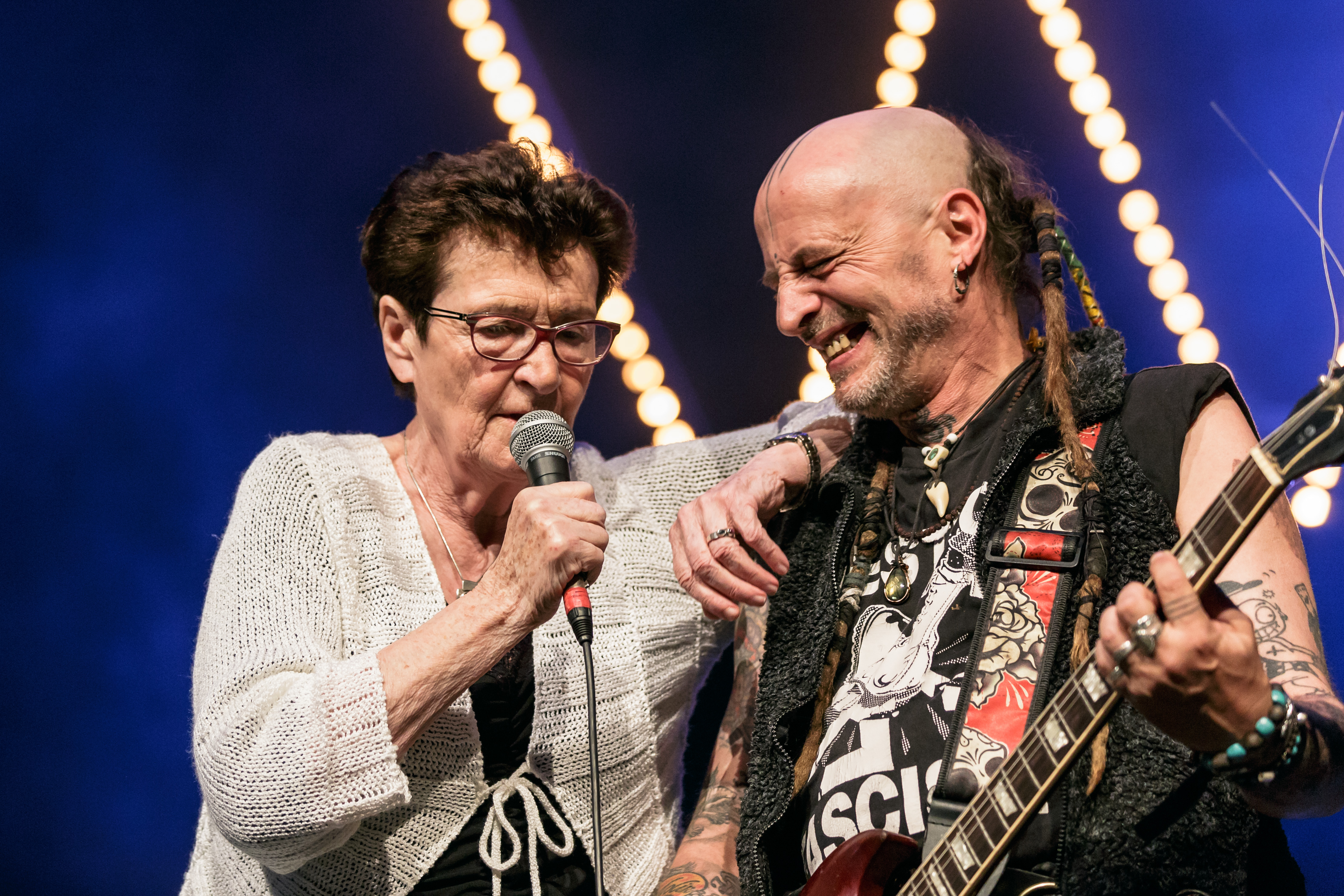 Les Ramoneurs de menhirs et la chanteuse Louise Ebrel en fest-noz au parc des expos de Penvillers à Quimper à l'occasion des 50 ans de la confédération des cercles War'l Leur le 29 avril 2017.